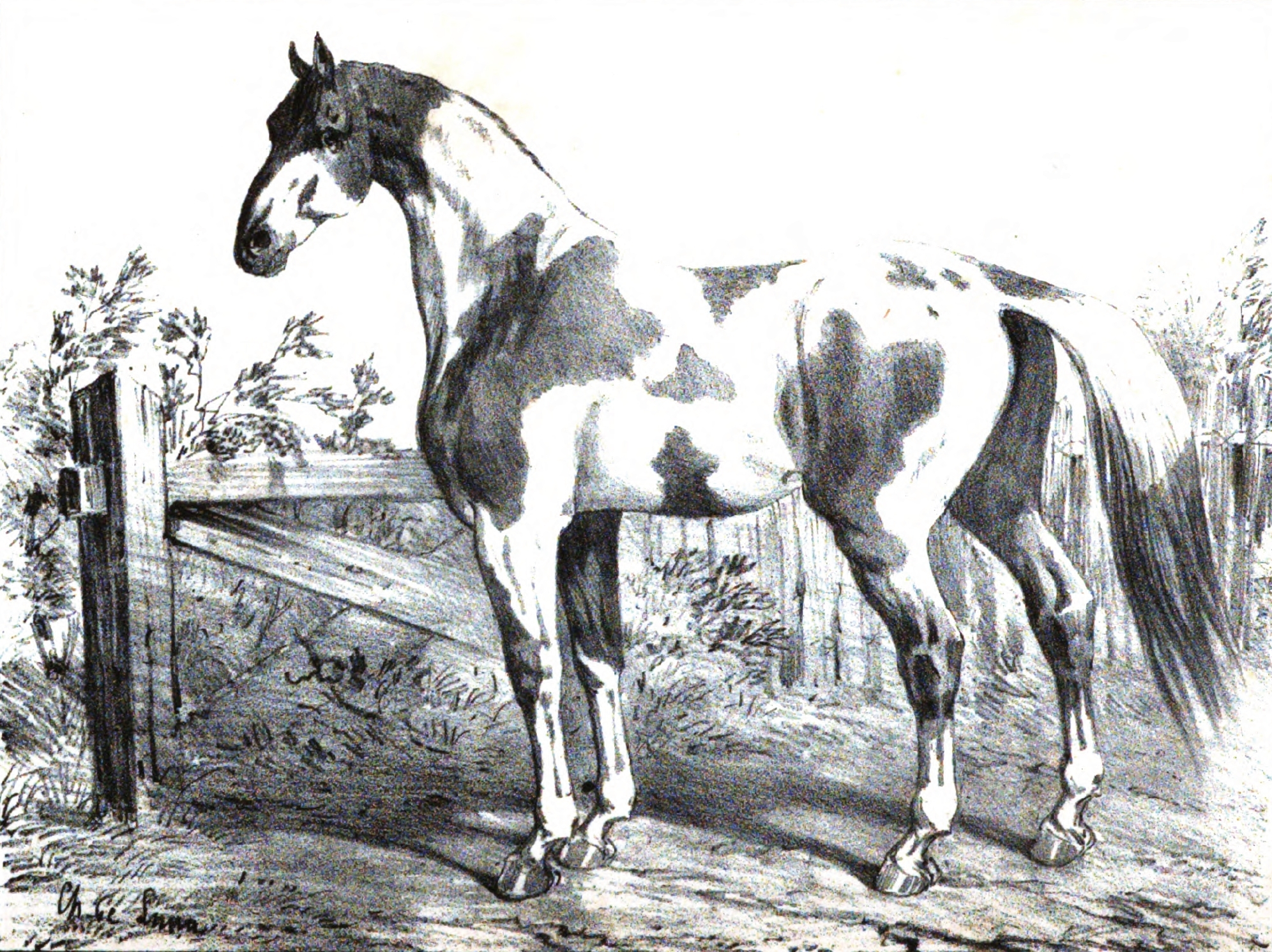 Cheval de Dongolah